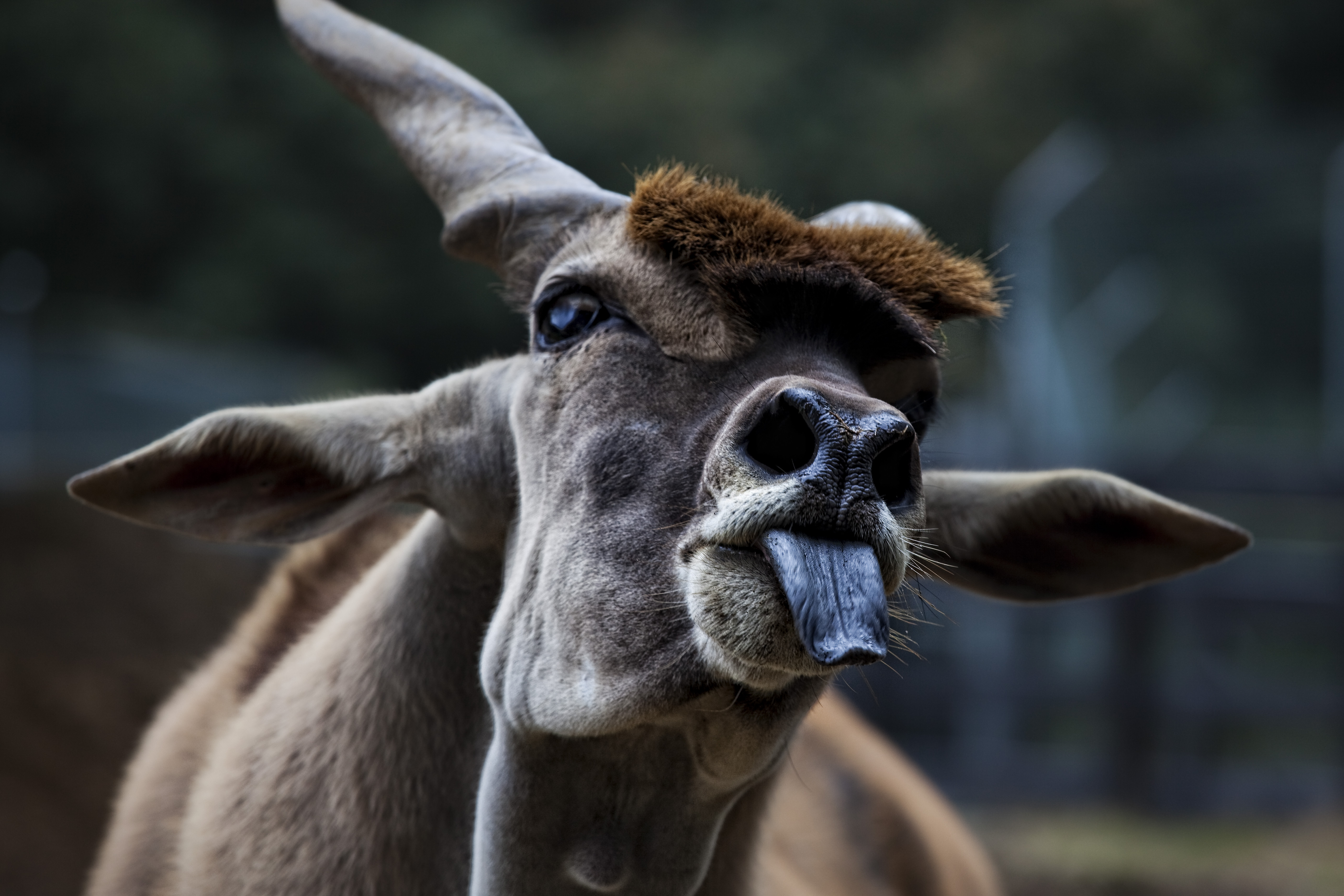 Taurotragus oryx. Marcelle, Outeiro de Rei, Galiza